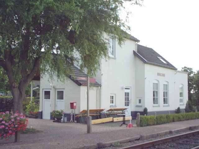 halte Eijs- Wittem